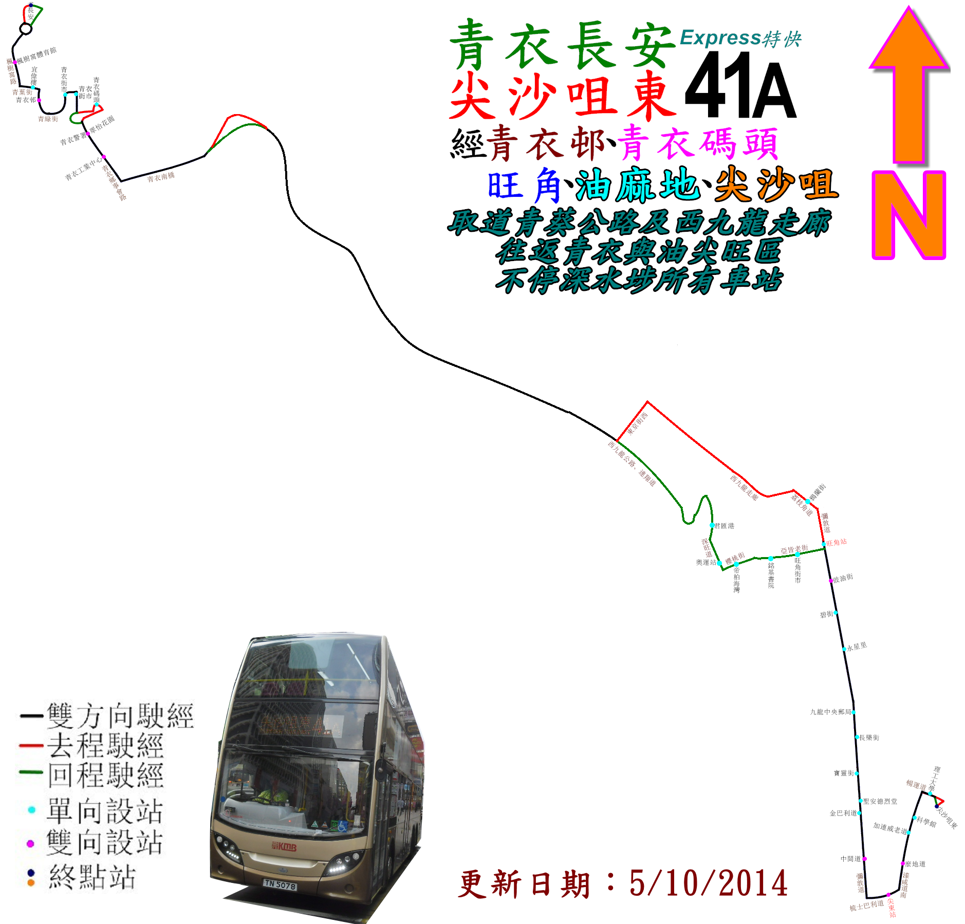 中文（香港）: 九巴41A線的走線圖